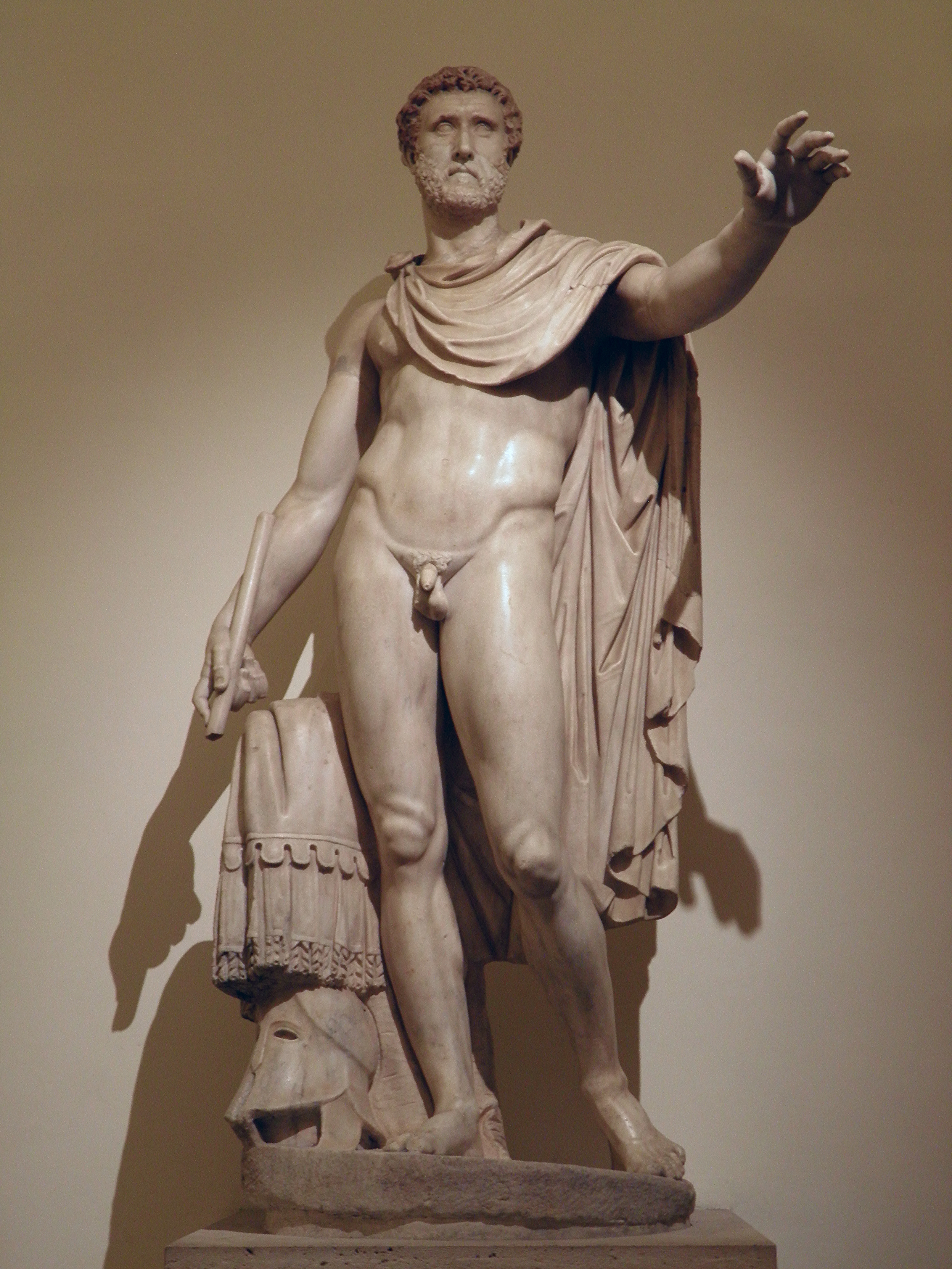 Antoninus Pius, Palazzo Altemps, Rome